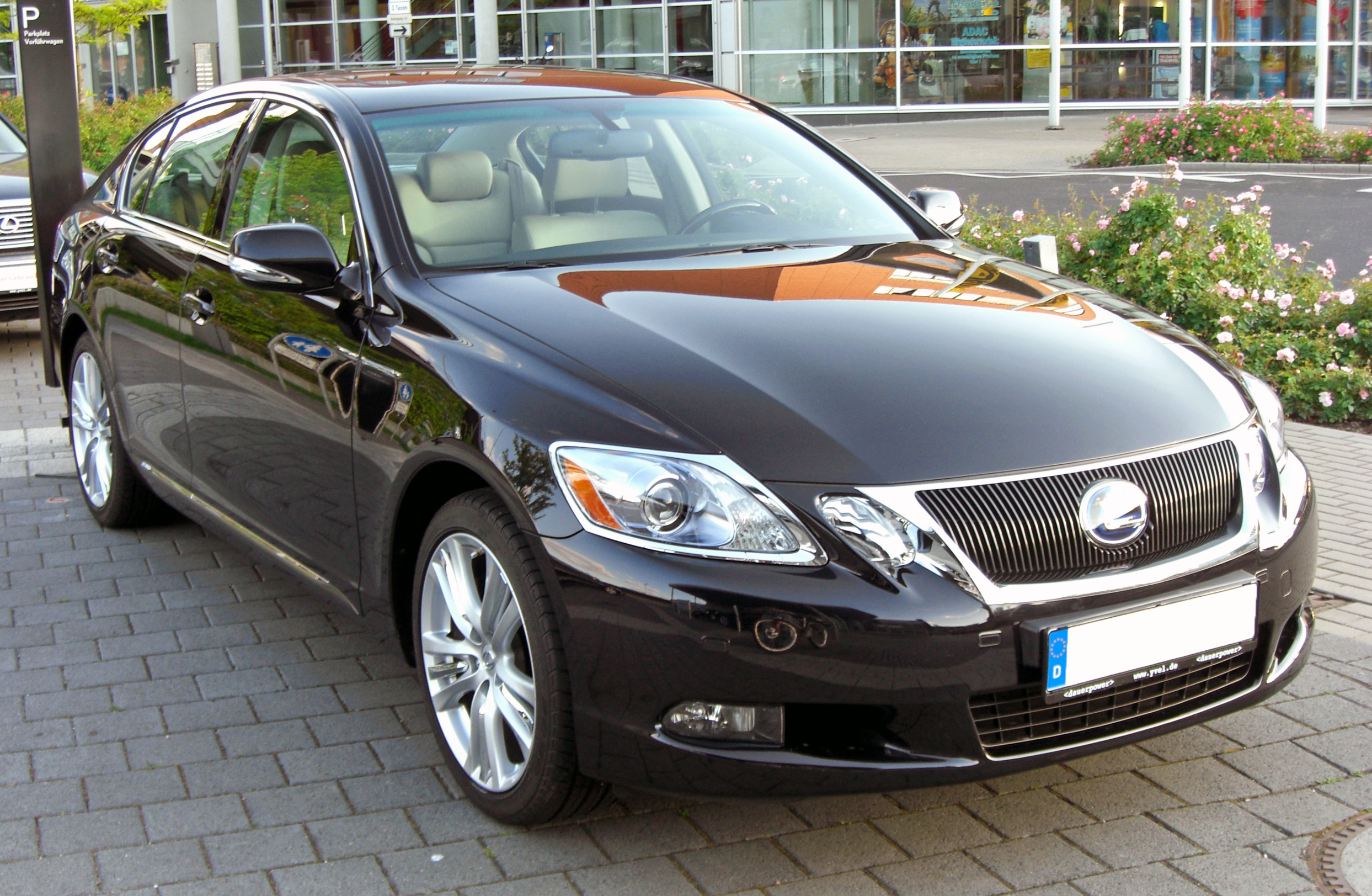 Lexus GS460